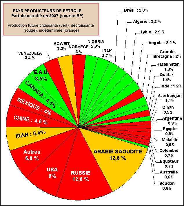 Part de marché des pays producteurs de pétrole en 2007 (source : British Petroleum Statistical Review of World Energy June 2008). Évolution future de la production : croissance (vert), décroissance (rouge) , orange (appréciations divergentes) (sources diverses)